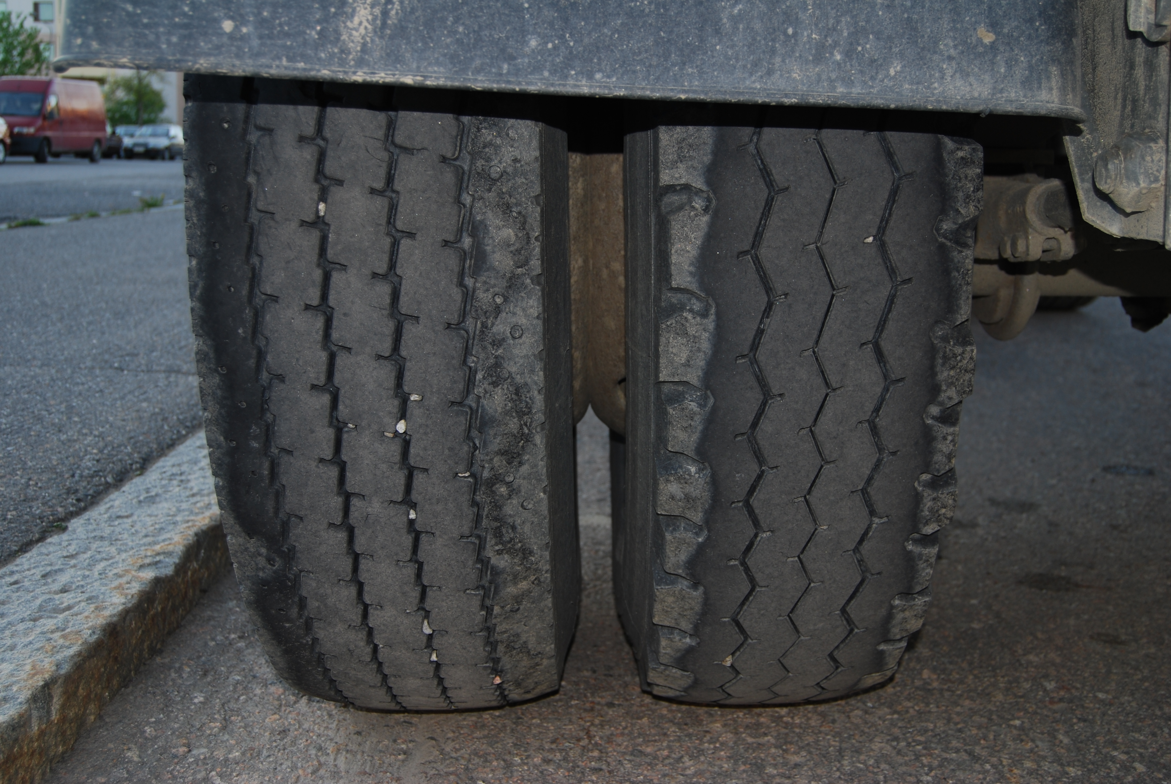 Dvojmontáž kol na přední nápravě přívěsu.